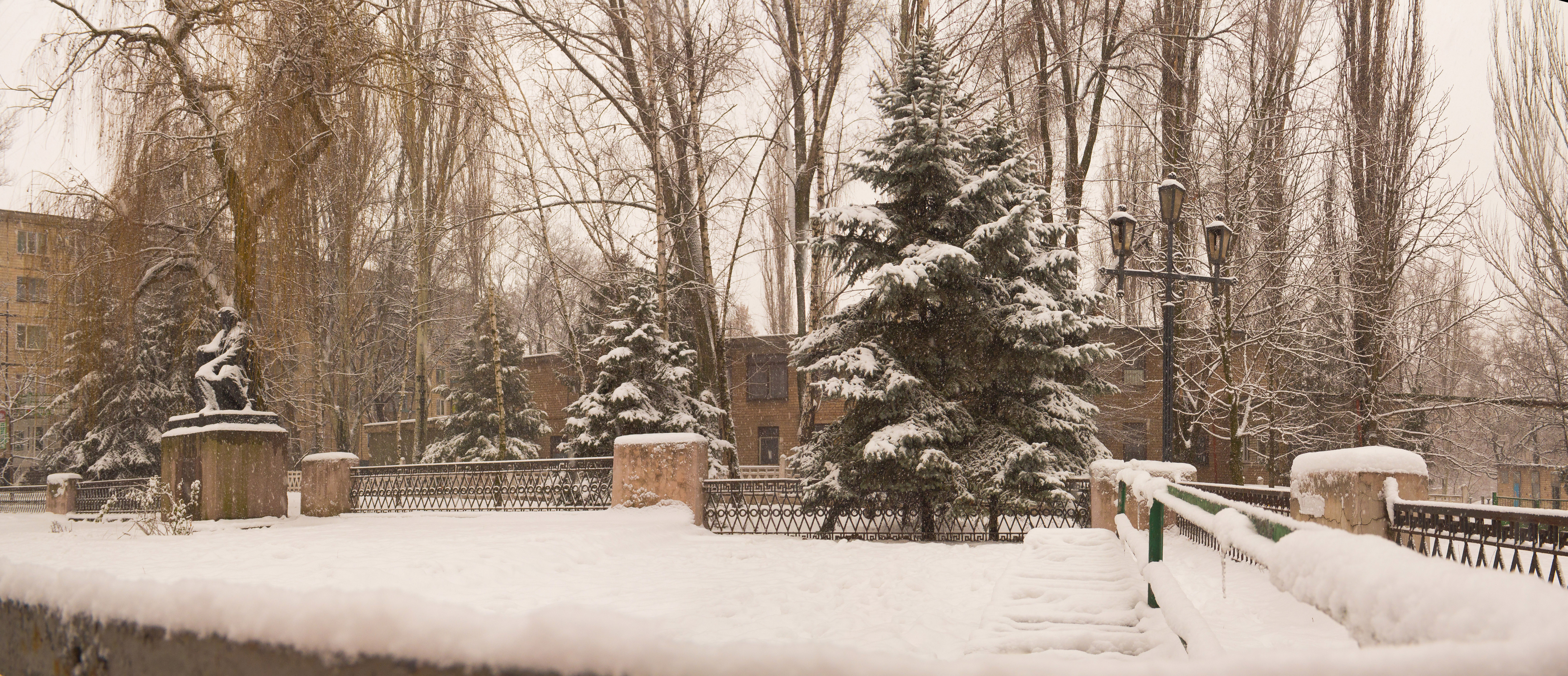 Пам’ятник О.С. Пушкіну, Кривий Ріг, вул. Пушкіна, 16